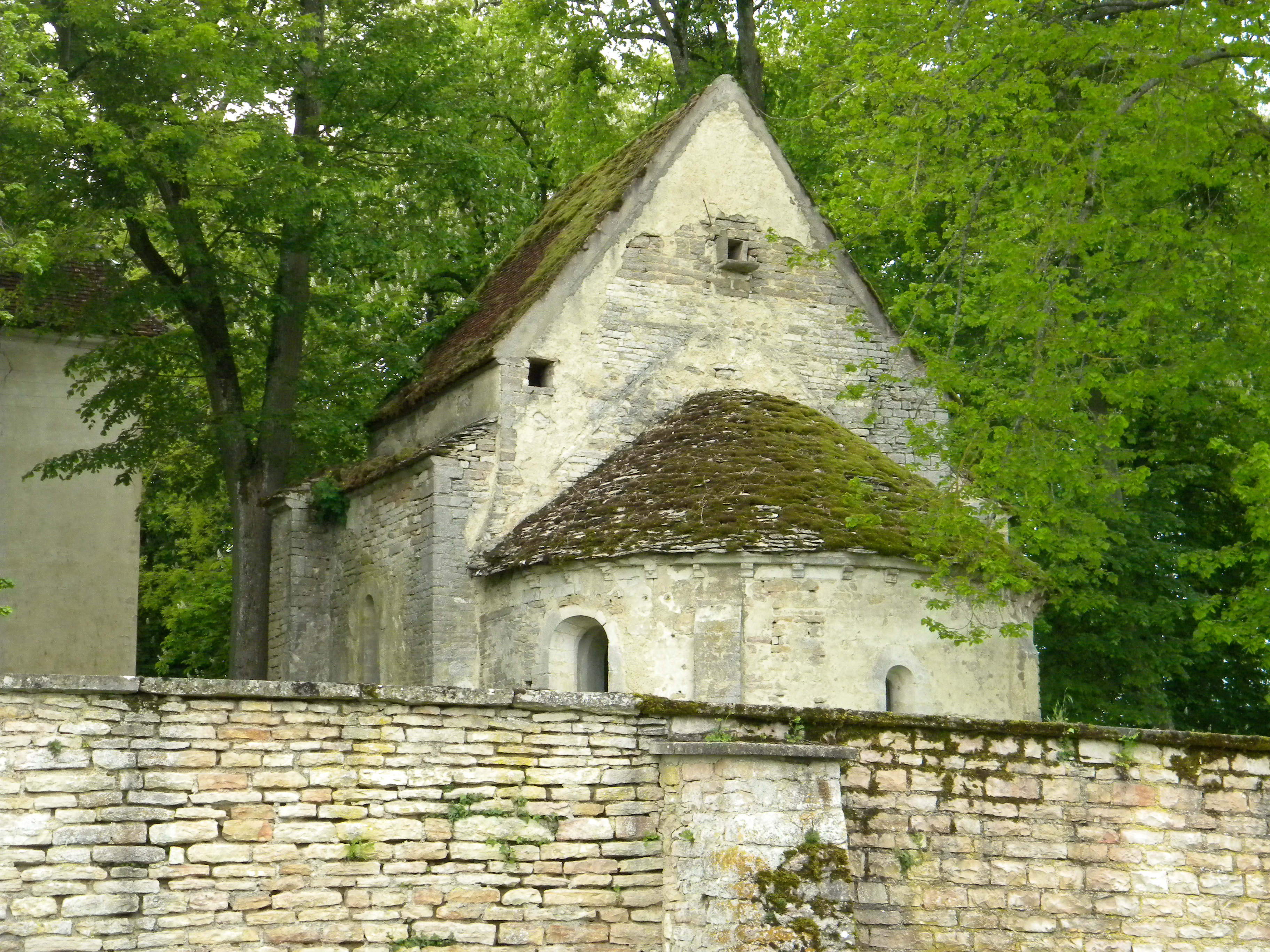 Chapelle du château de Broindon